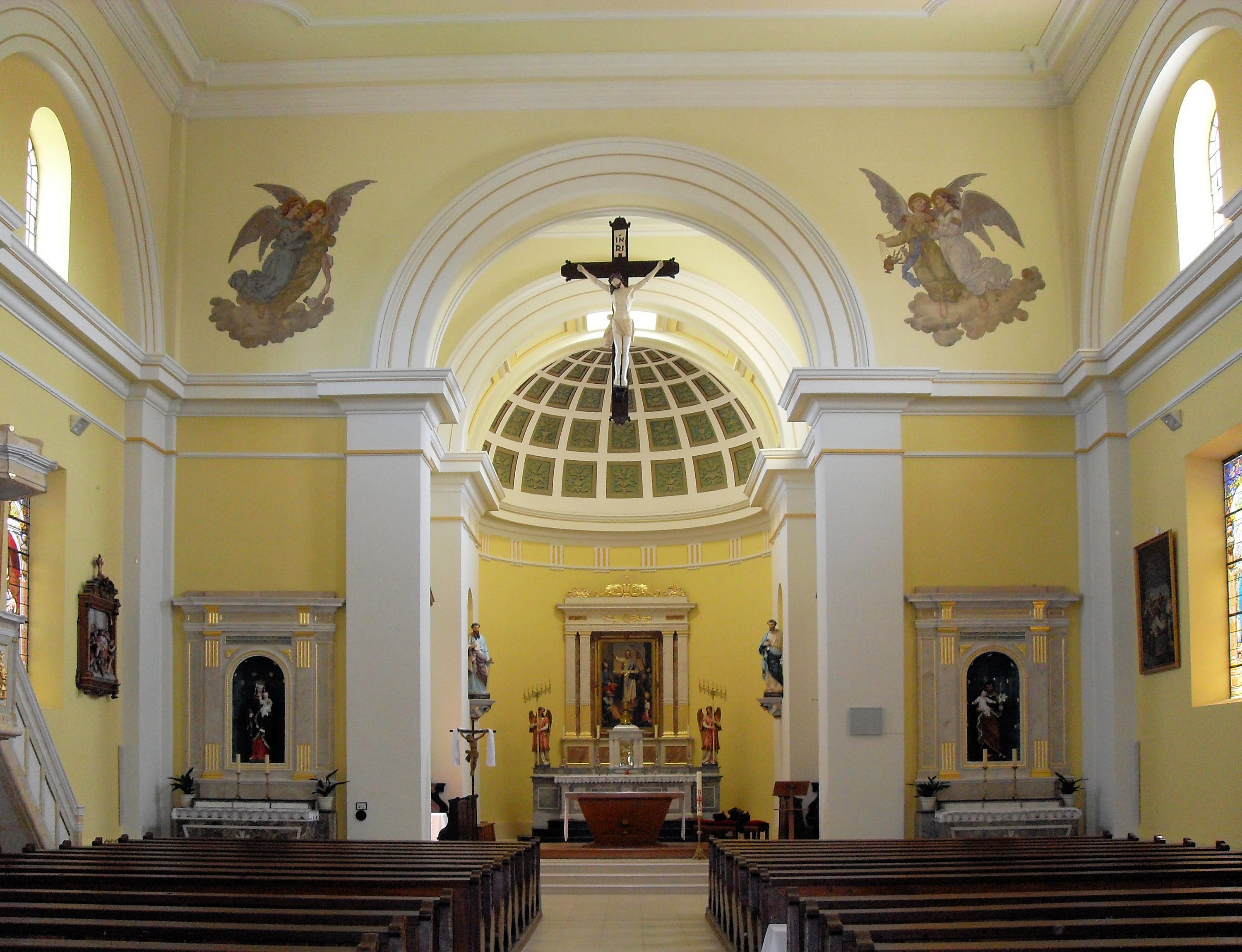 L'intérieur d'église Saint-Jacques-le-Majeur à Heiteren